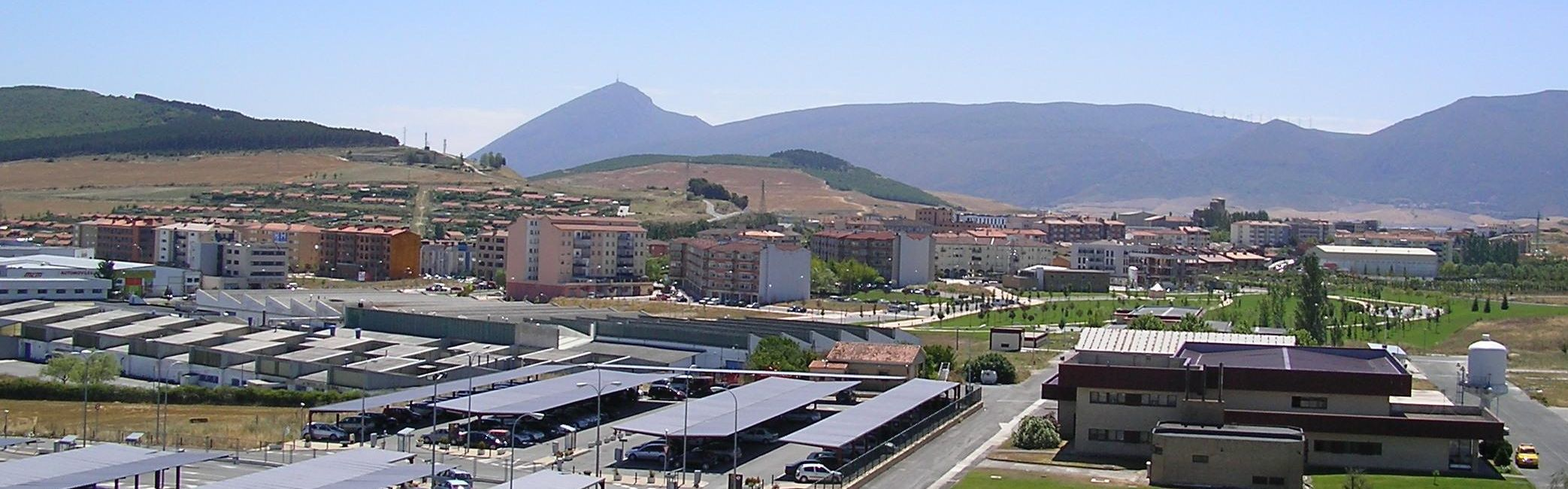 Noain, foto tomada desde la torre de control del aeropuerto